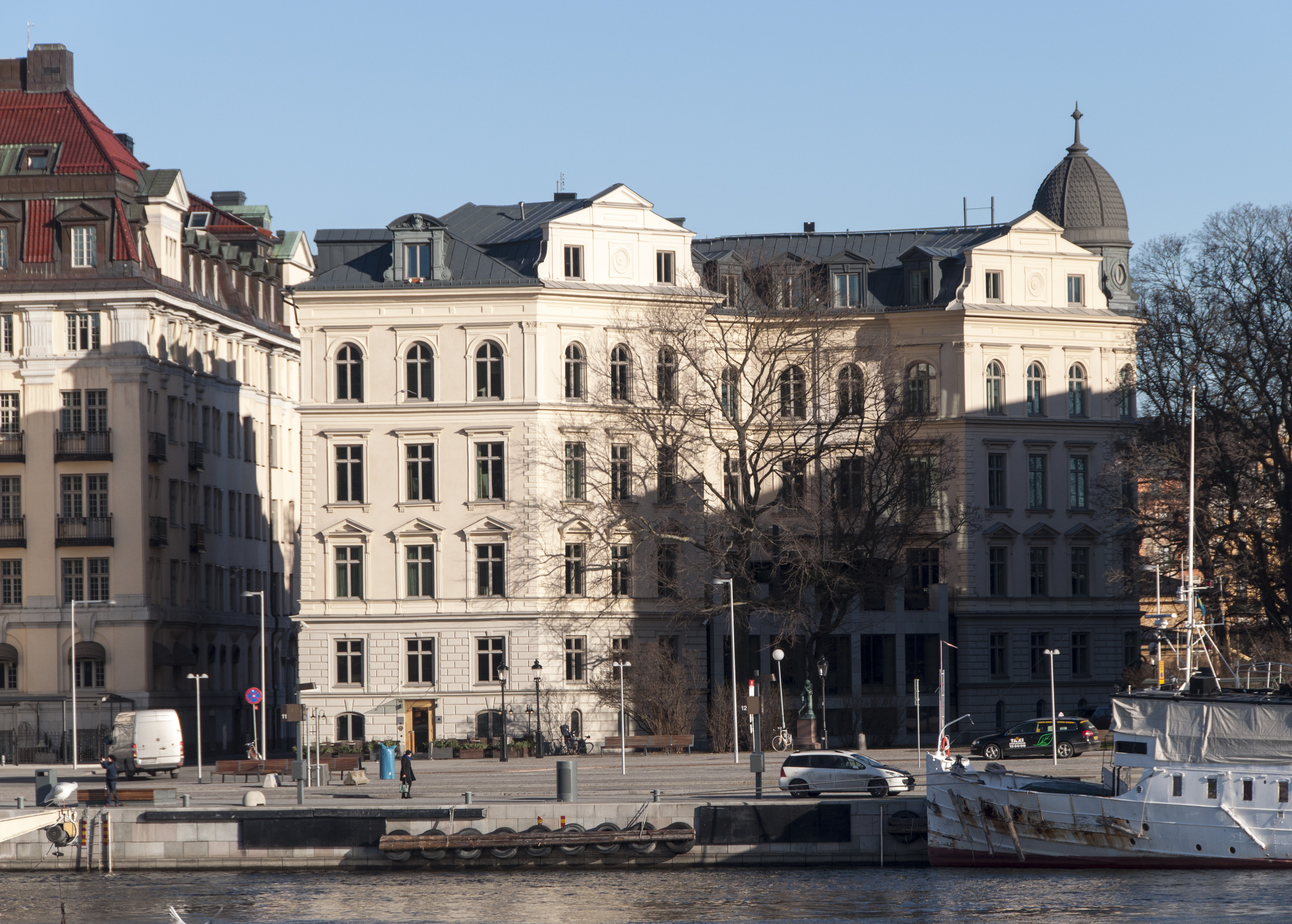 Lydmar Hotel, Sillhovet 3, Hovslagargatan 2, Nybyggnadsår 1881 - 1882, Andreas Gustaf Sällström (Byggmästare) C. F. Edelstam (Byggherre) Axel Kumlien (Arkitekt)